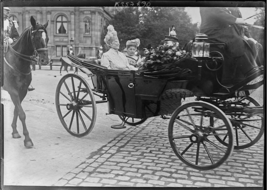 Photographie de Louise, reine du Danemark (1851-1926) et Jeanne Fallières (1849-1934) lors de la visite en France de Frédéric VIII (1843-1912 ; roi de Danemark) le 15 juin 1907 par l'Agence photographique Rol publiée pa BNG/Gallica.